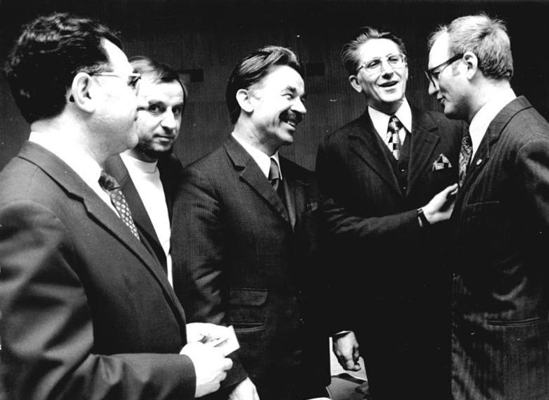 ADN-ZB Katscherowski 14-11-73 Berlin: VII. Schriftstellerkongreß - Eröffnungstag Freundschaftliches Gespräch in einer Kongreßpause zwischen Hermann Kant (r.), Ryszard Markiewicz, Rat der Botschaft der VR Polen in der DDR (2.v.r.), Jan Koprowski, Vorsitzender der Auslandskommission der Leitung des polnischen Schriftstellerverbandes (3.v.r.) und dem Übersetzer (2.v.l.). Der Schriftstellerkongreß der DDR nahm am Vormittag des 14.11.73 in der Berliner Kongreßhalle seine dreitägige Arbeit auf.